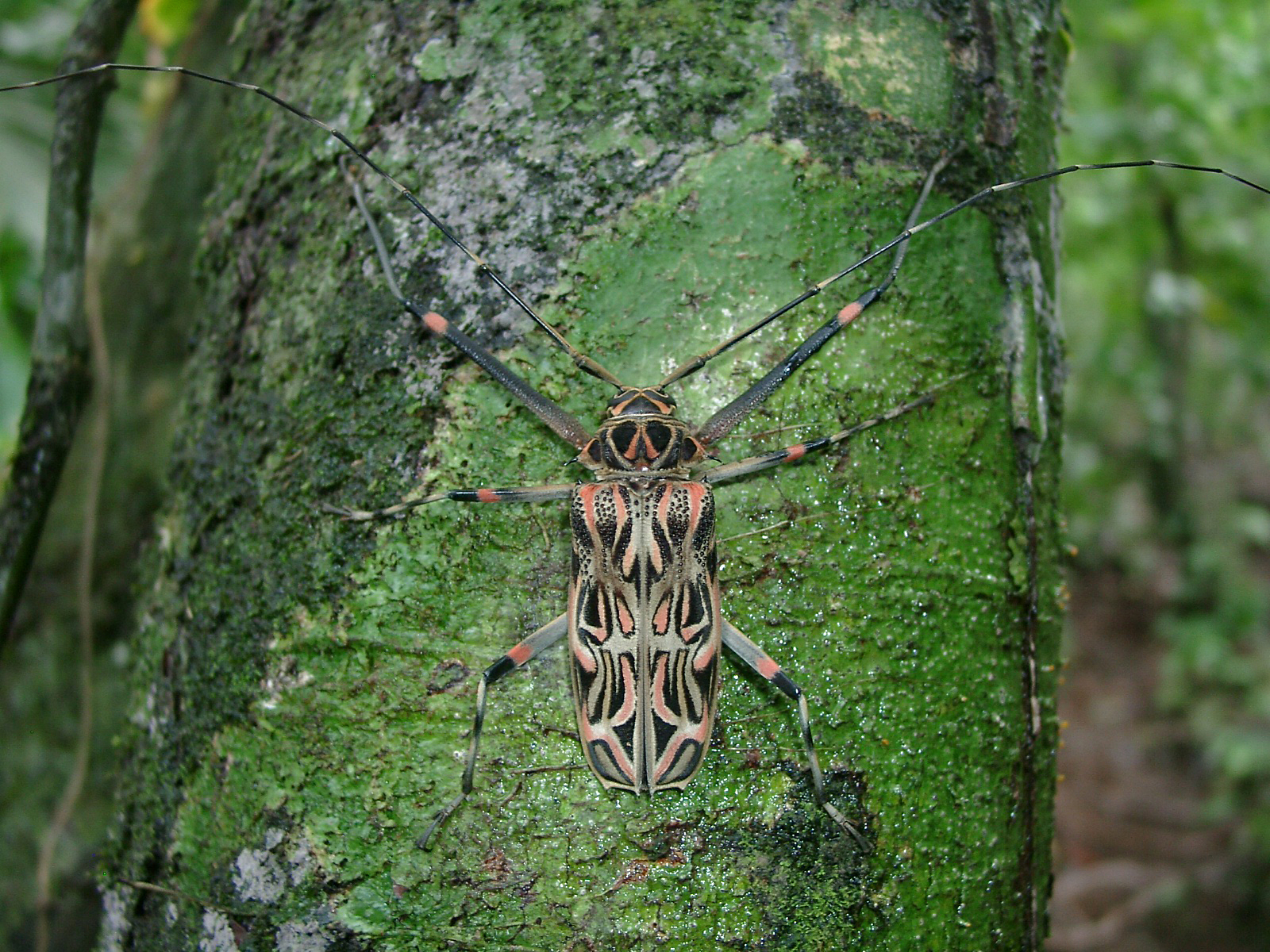 Harlekinbockkaefer